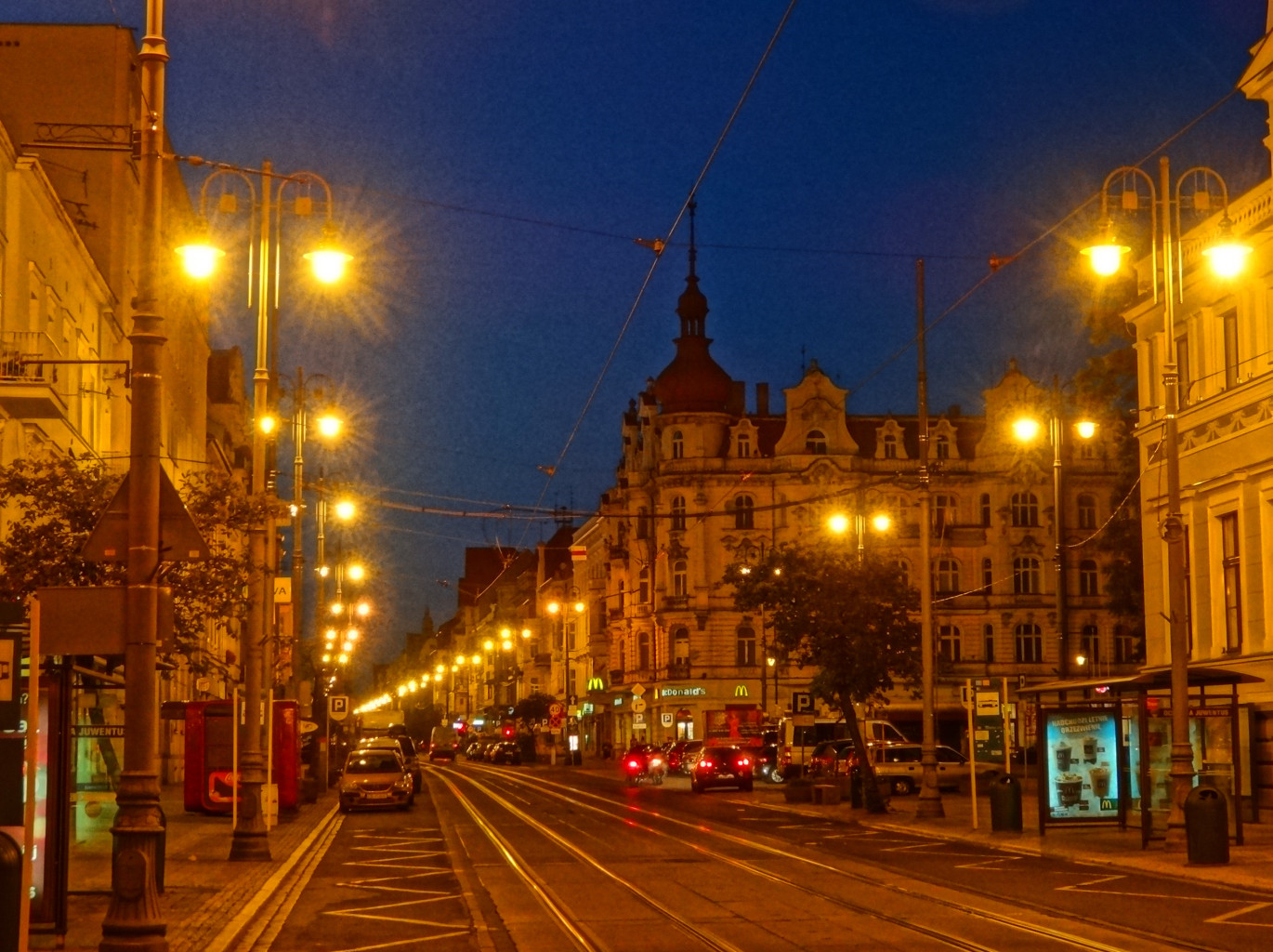 Ulica Gdańska w Bydgoszczy